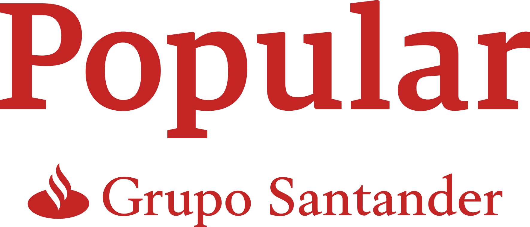 Logo Oficial del Banco Popular Español, perteneciente desde 2017 al Grupo Santander.